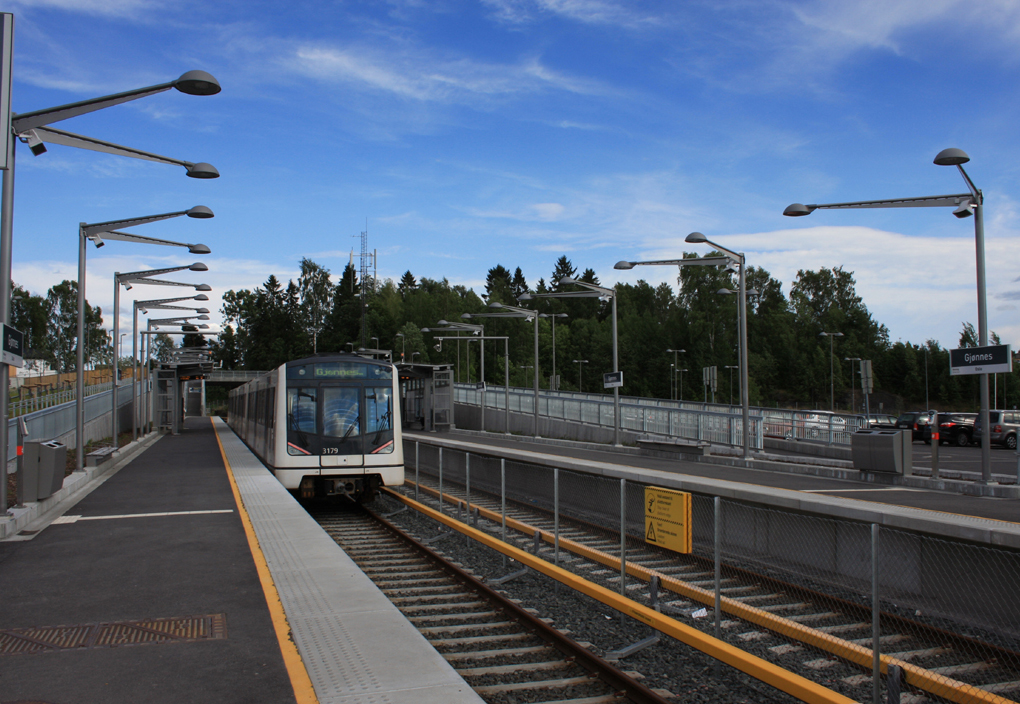 Gjønnes T-banestasjon sett fra vestgående plattform.